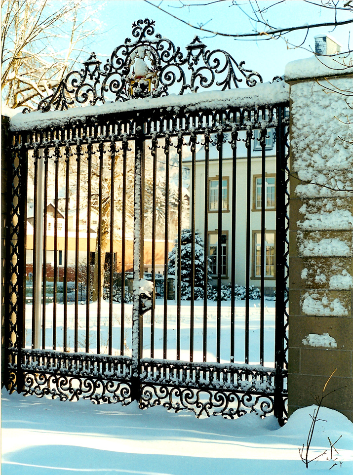 Grille d'entrée d'une propriété appartenant au Ministère des Finances à Malmedy (Belgique). La grille aurait été forgée par Henri Metzmacher (1873-1951). Dans la partie supérieure de la grille, au dessus du blason comportant un dragon noir, une inscription : Insignia Abbatiae imperialis. Le bâtiment (arrière-plan) a été construit entre 1912 et 1914, sous le régime prussien.